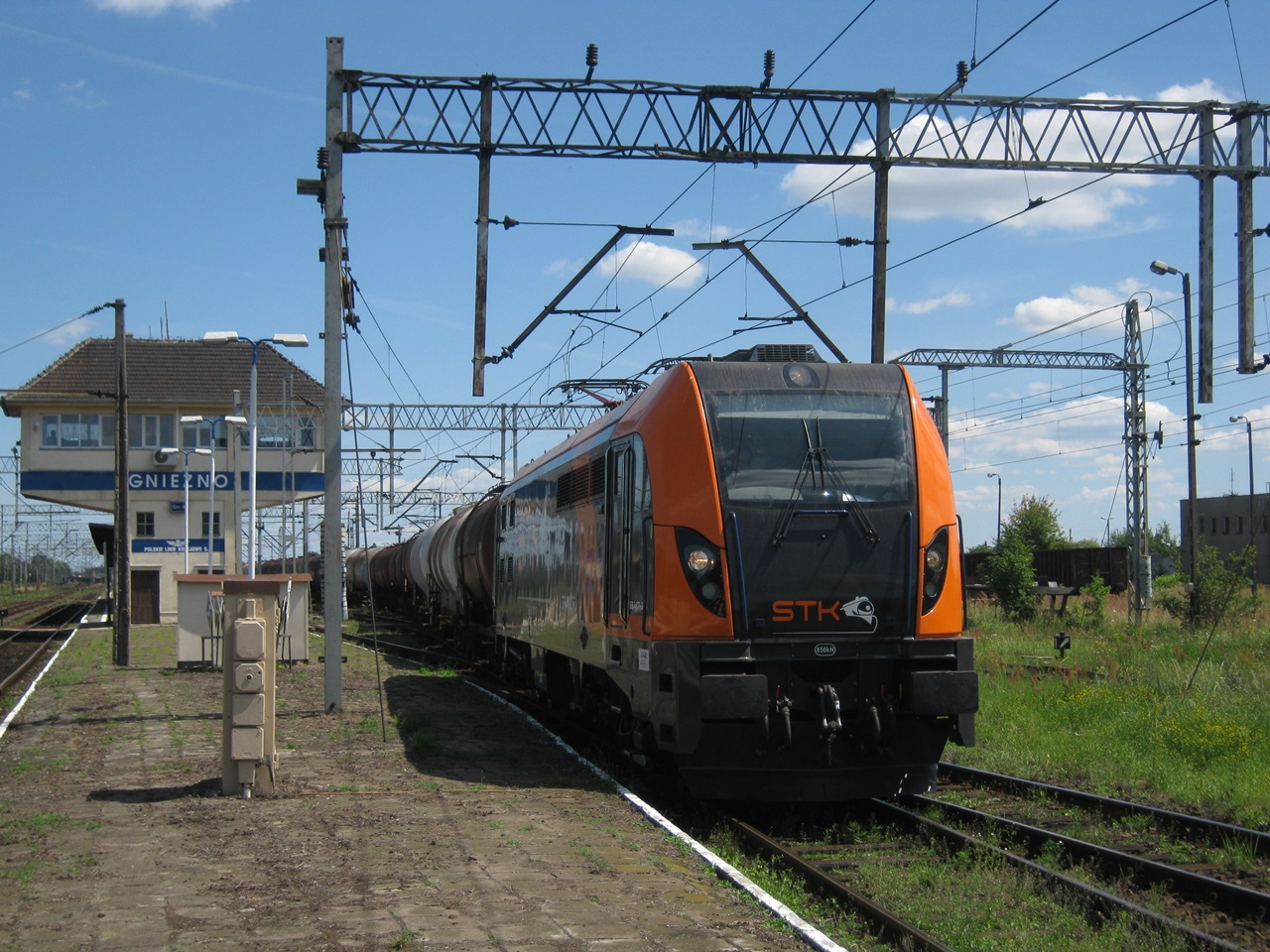 E6ACT-001 Dragon odjeżdża ze stacji Gniezno, 23.07.12r.